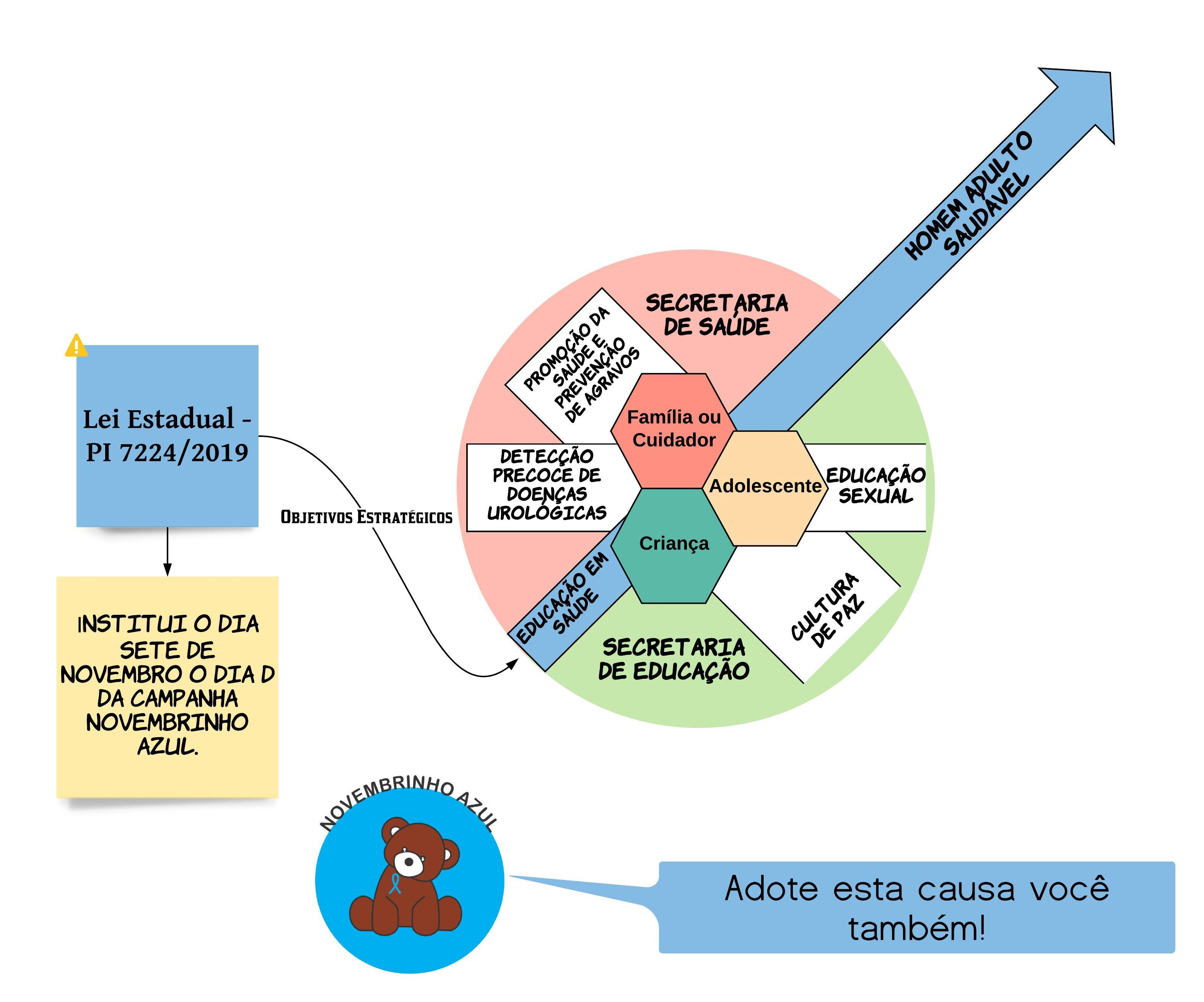 Diagrama de Gestão da Lei Novembrinho Azul 7224/2019